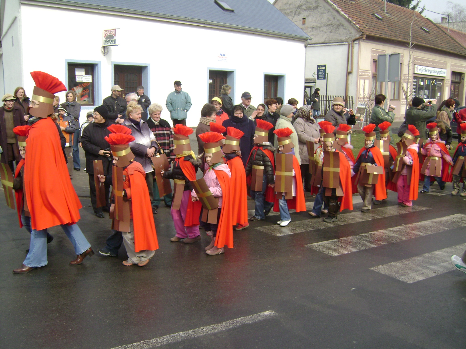 Pokladni karneval u Belom Manastiru